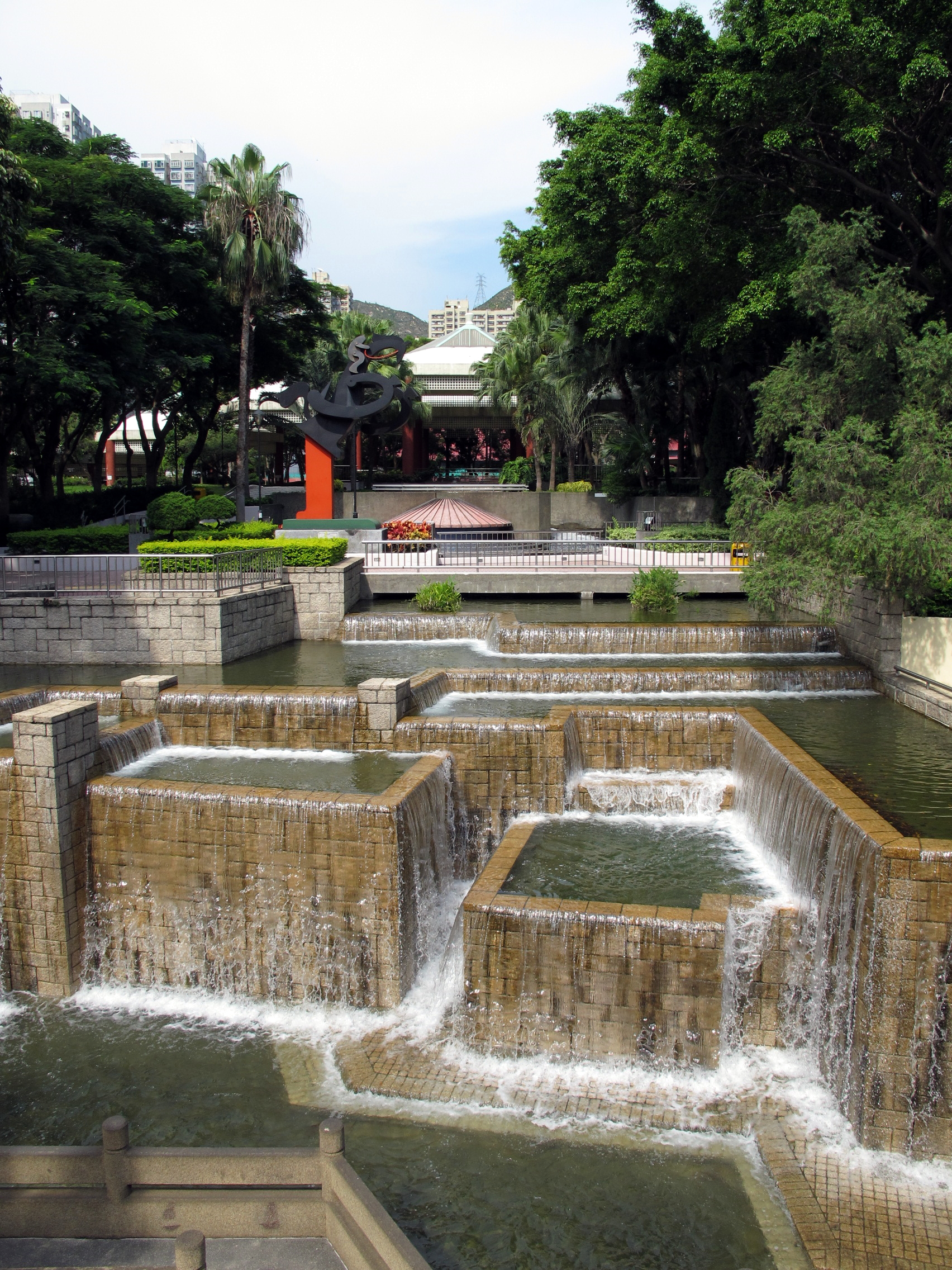 HK Tuen Mun Park Cascade